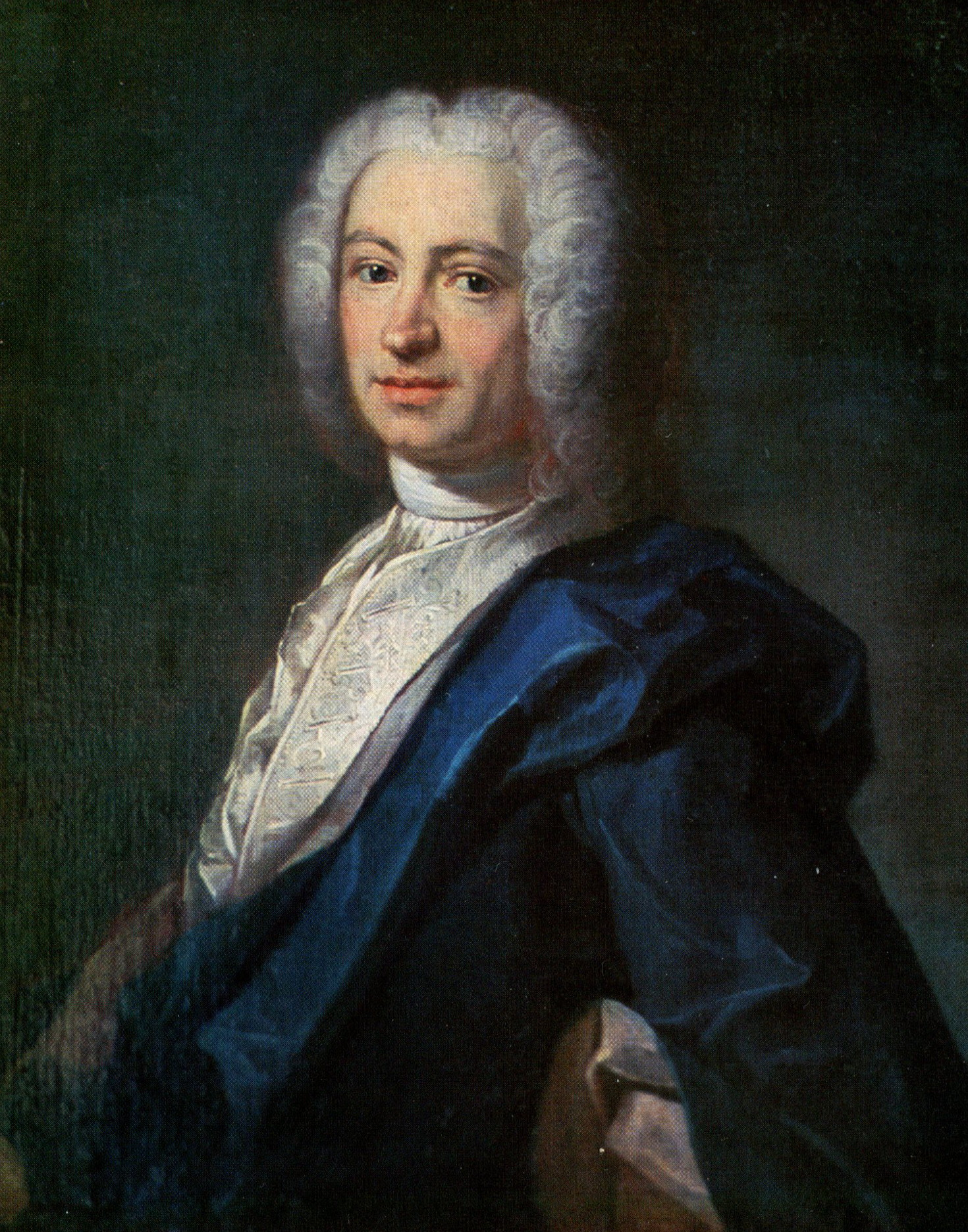 Mathias Benzel, adlad Benzelstierna